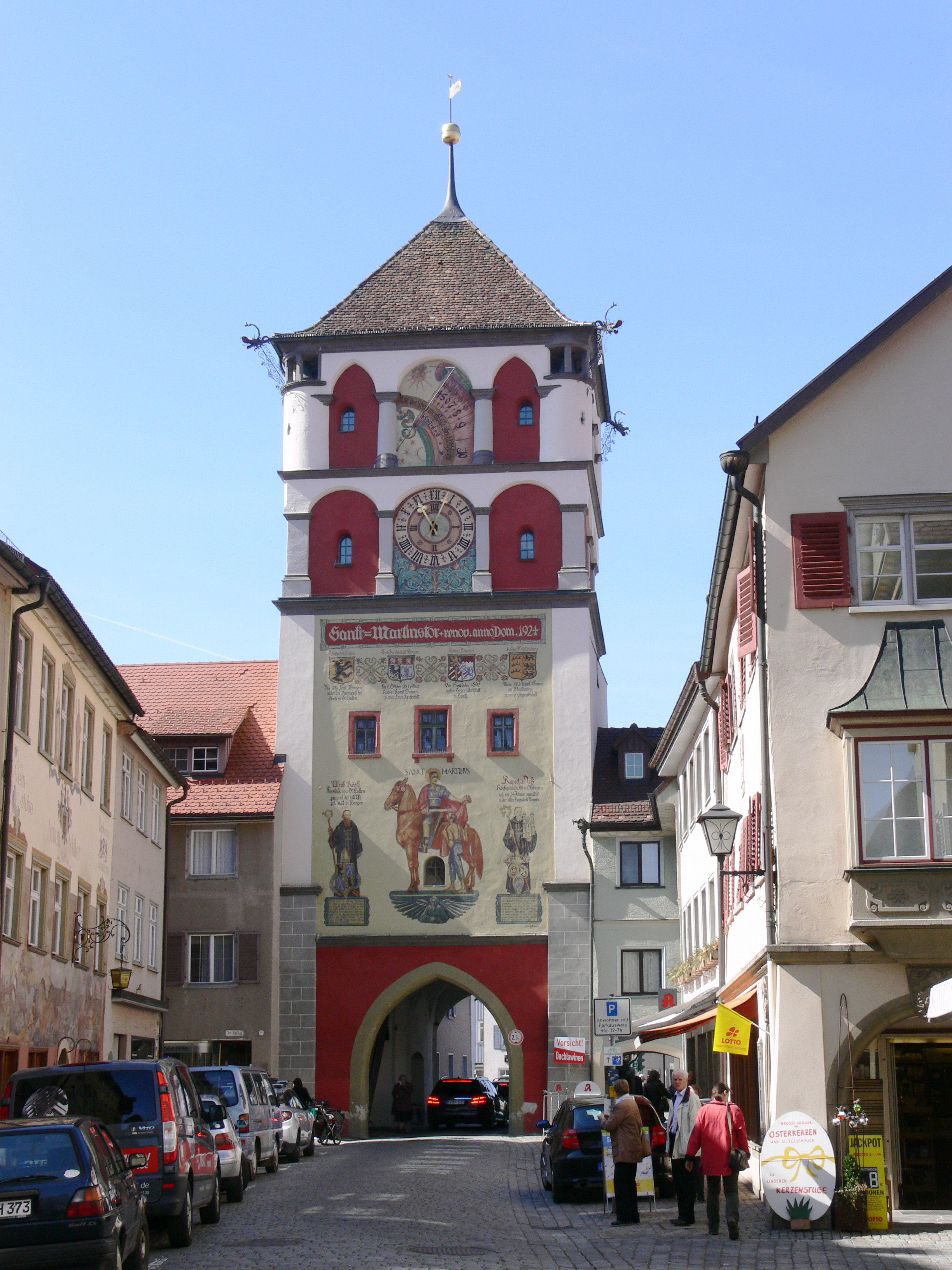 Wangen im Allgäu, Martinstor (Lindauer Tor), Stadtseite